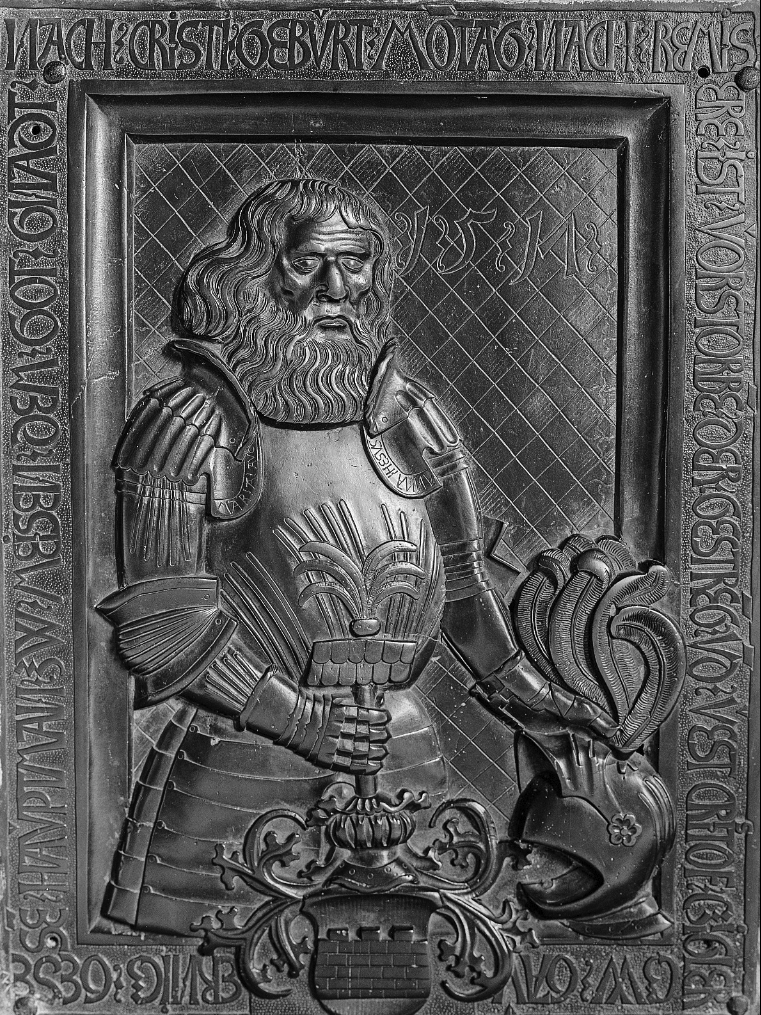 Christoph Ziegler († 1517) – ridder og amtmann av Meißen for hertugen av Kurfyrstedømmet Sachsen.